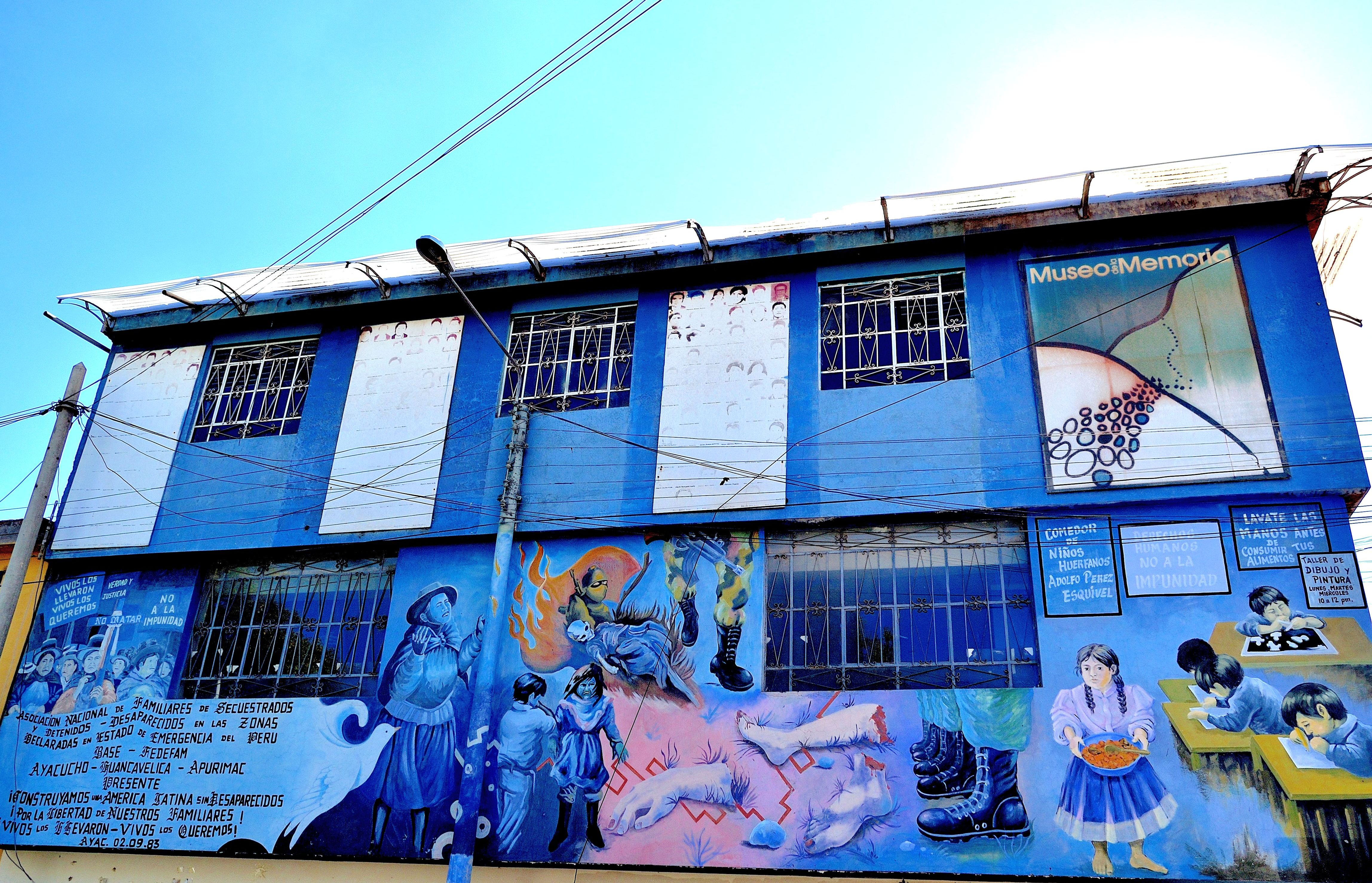 Frontis